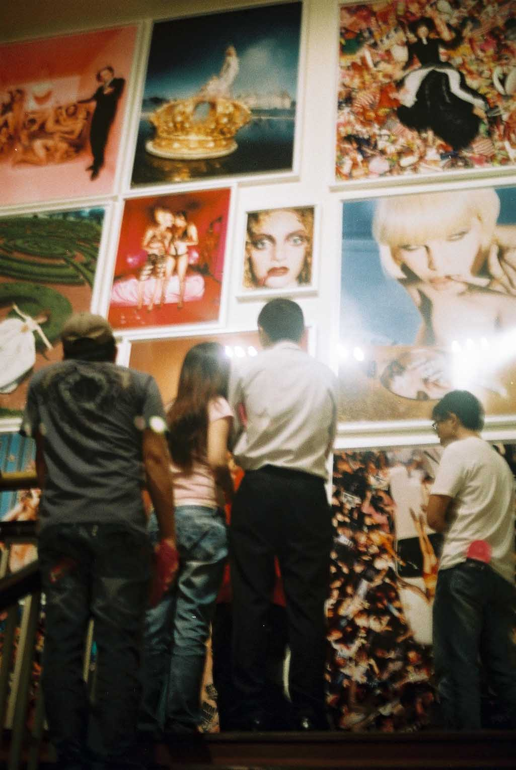 Excessive Consumption